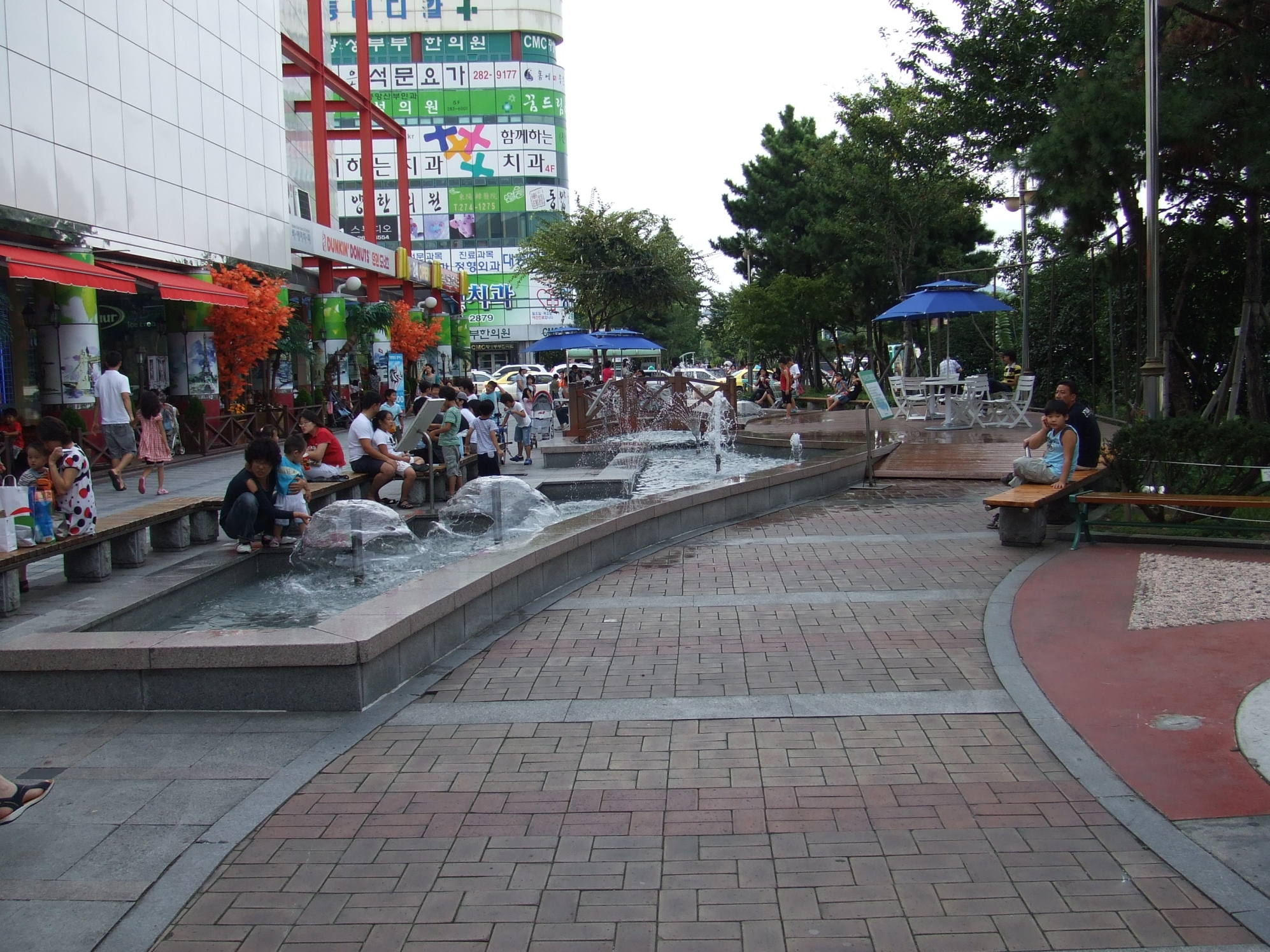 대동백화점의 분수대